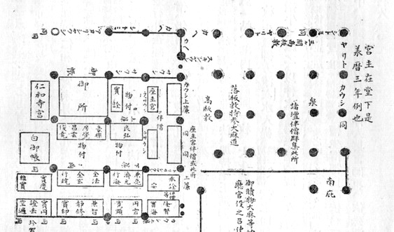 平清盛の六波羅泉殿の指図（山槐記、治承2年11月12日条）